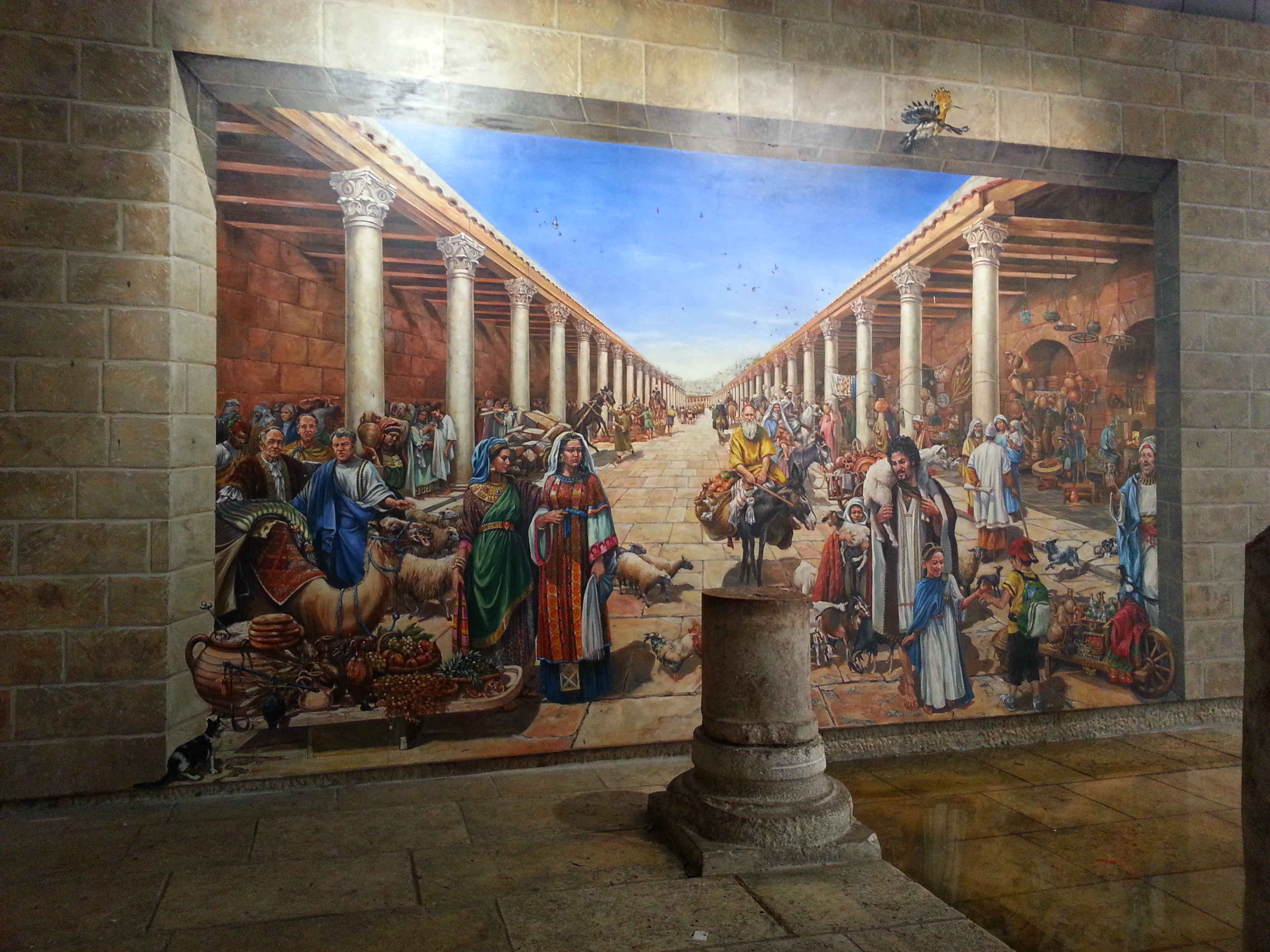 מראה בעיר העתיקה